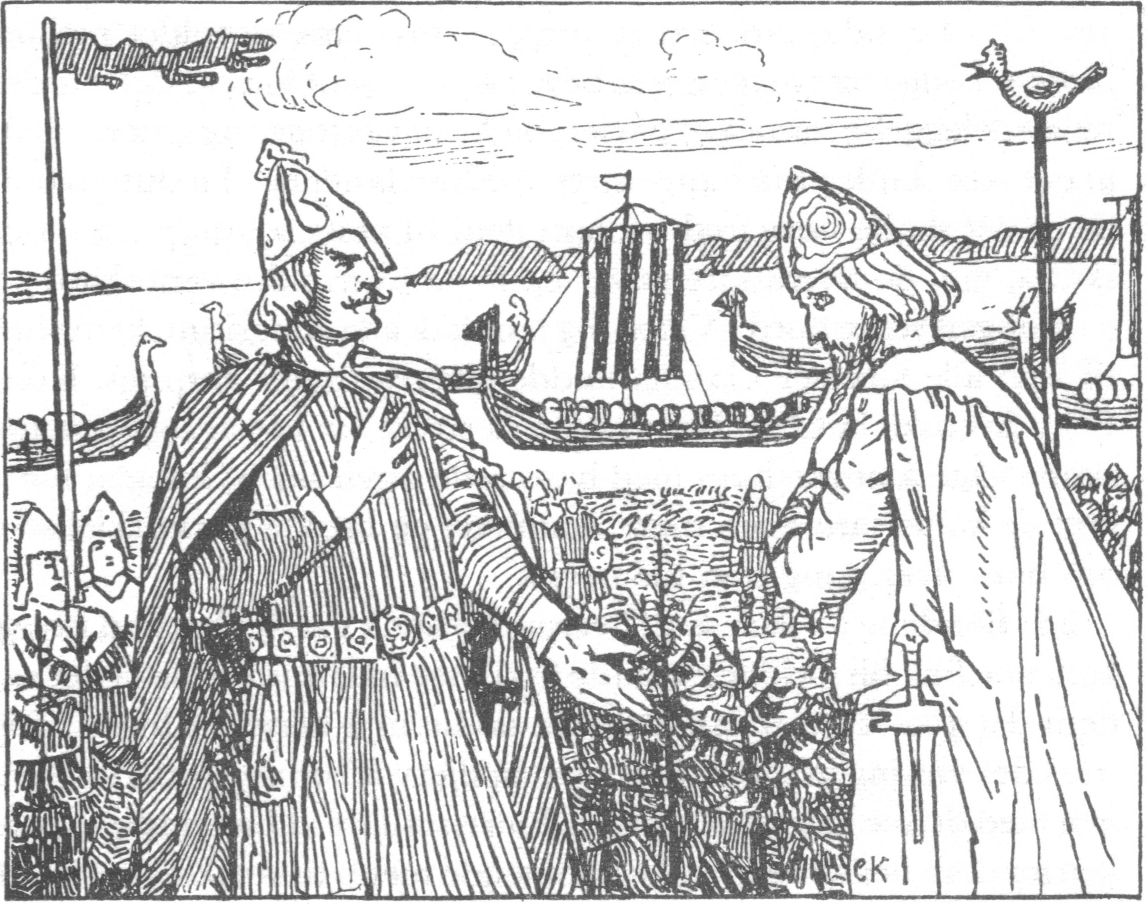 Christian Krohg: Illustration for Olav den helliges saga, Heimskringla 1899-edition. nn: «Kong Olav møter Ragvald jarl ved Göta elv.»